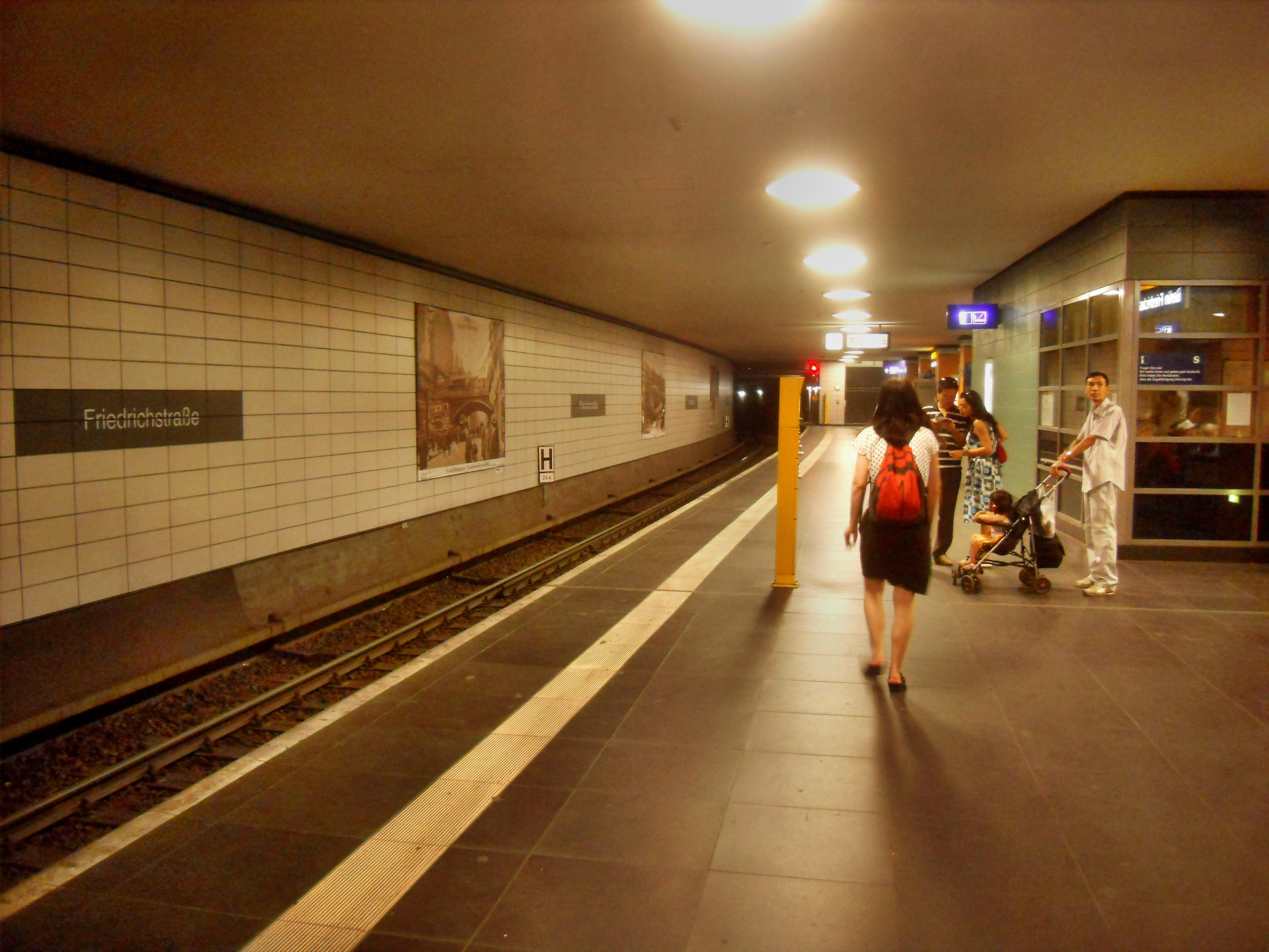 Bahnsteig D des Bahnhofs Friedrichstraße in Deutschland, von denen Züge der Linien S 1, S 2 und S 25 der S-Bahn Berlin verkehren